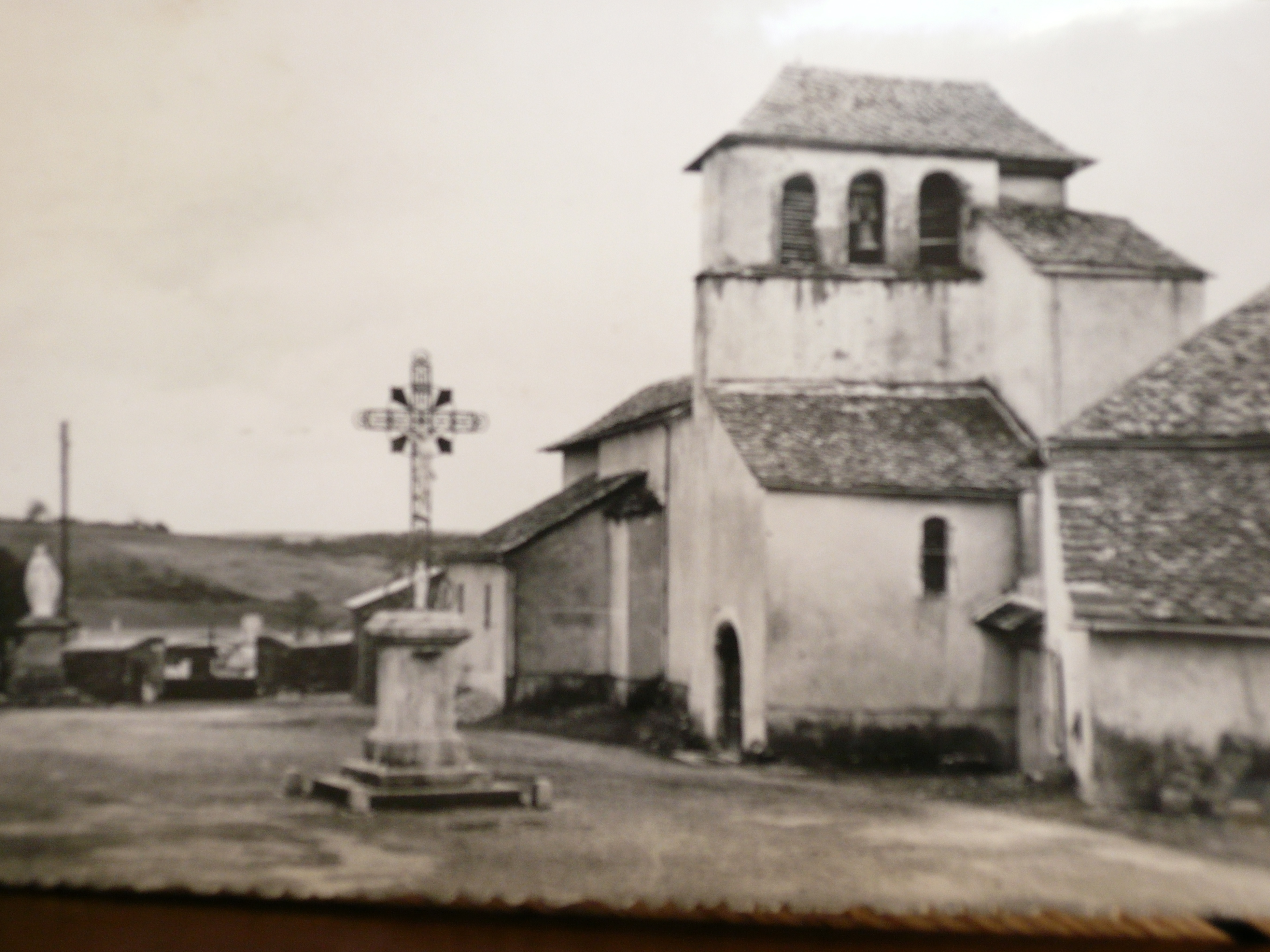 Eglise de "Notre Dame d'Aures" Aveyron